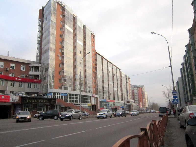 Верхняя часть улицы Смолина в Улан-Удэ.